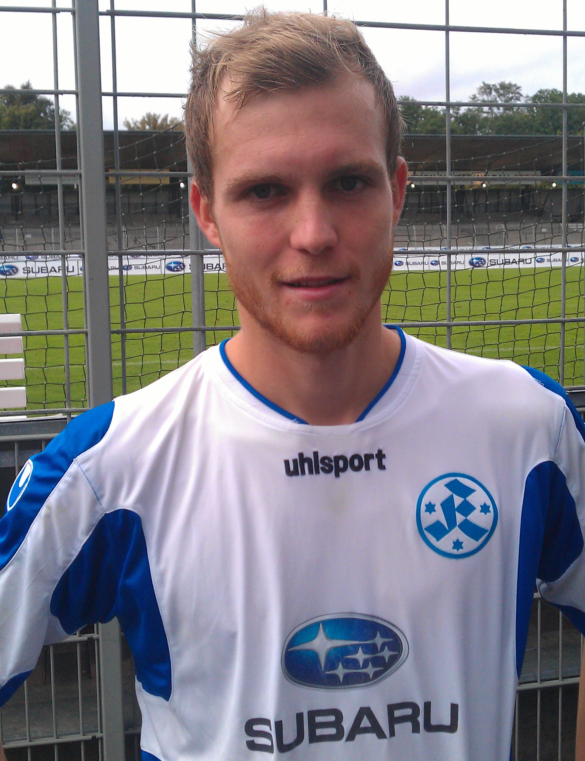 Fabian Baumgärtel 2013 im Trikot der Stuttgarter Kickers